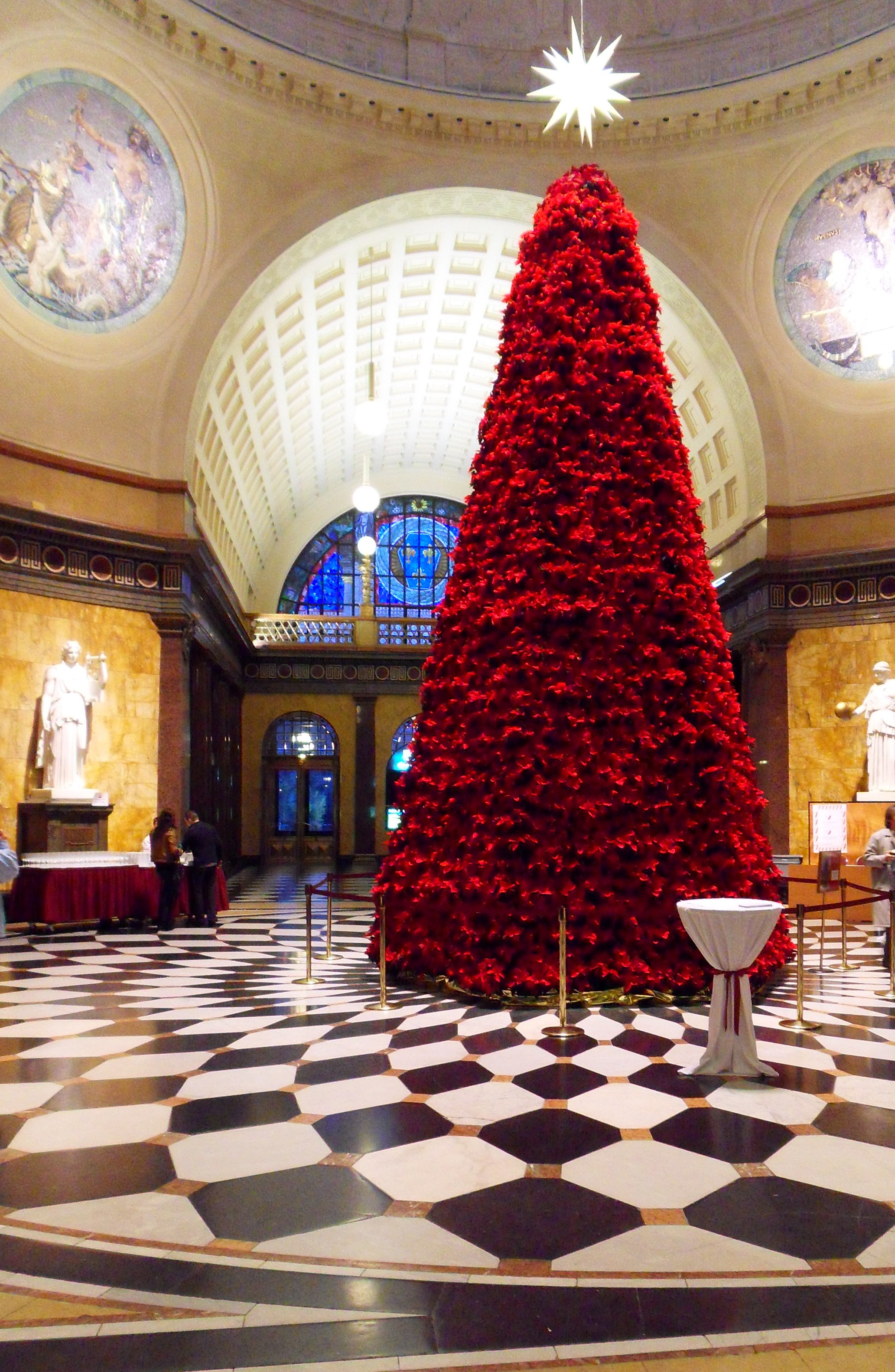 Traditionelle vorweihnachtliche Blumendekoration im Foyer des Wiesbadener Kurhauses aus unzähligen zu einem mehrere Meter hohen Kegel angeordneten Weihnachtssternen.